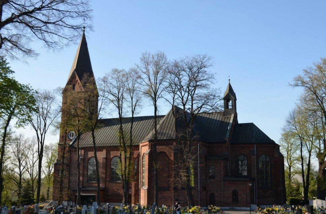 Kościół Trójcy Świętej w Wieszowie. Mieszkańców -1995 , Wiernych - 1875